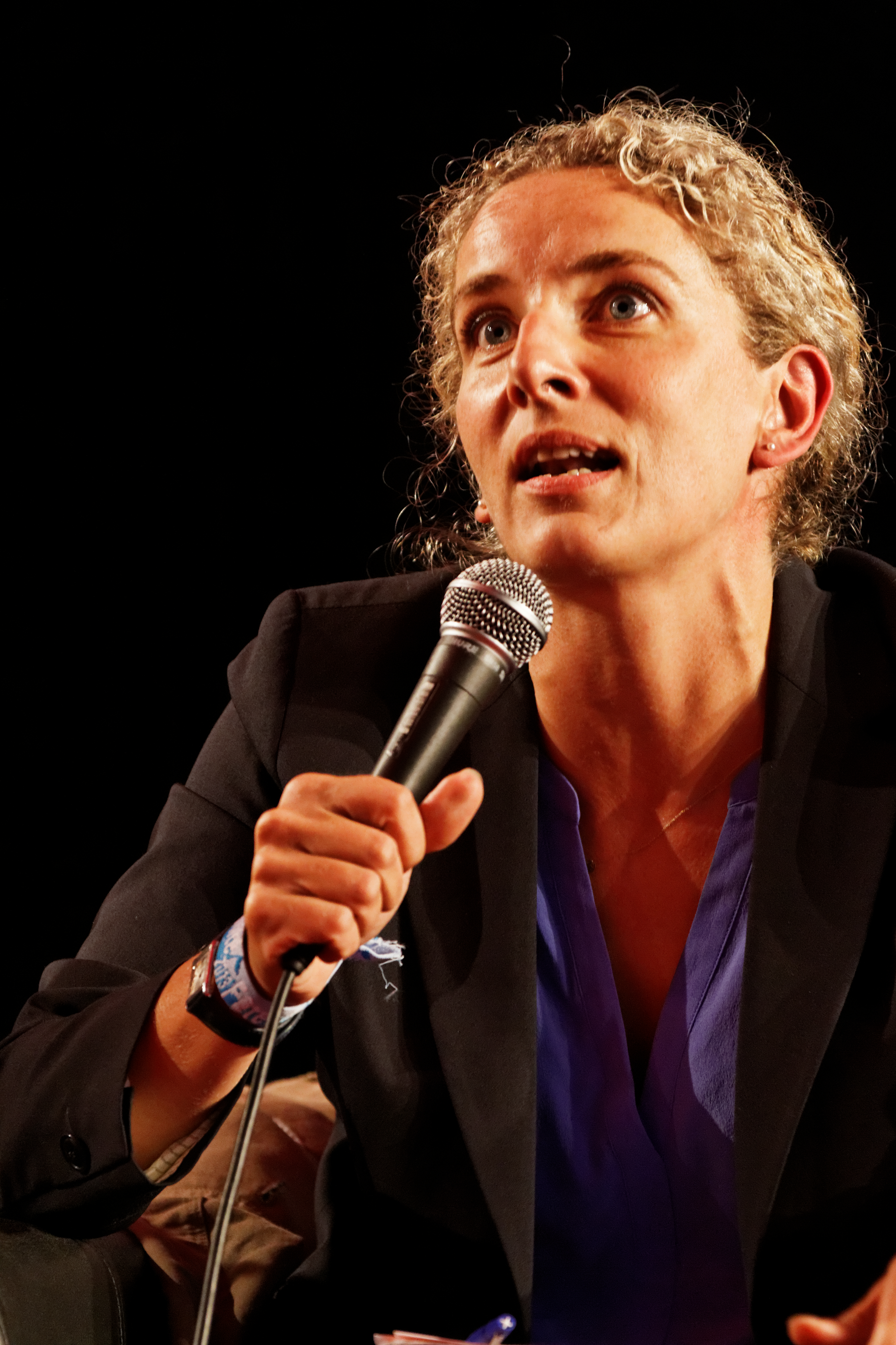 André Chassaigne, Corinne Morel-Darleux, Jérôme Gleizes et Delphine Batho débattent sur la transition écologique à l'Agora lors de la Fête de l'Humanité 2013.